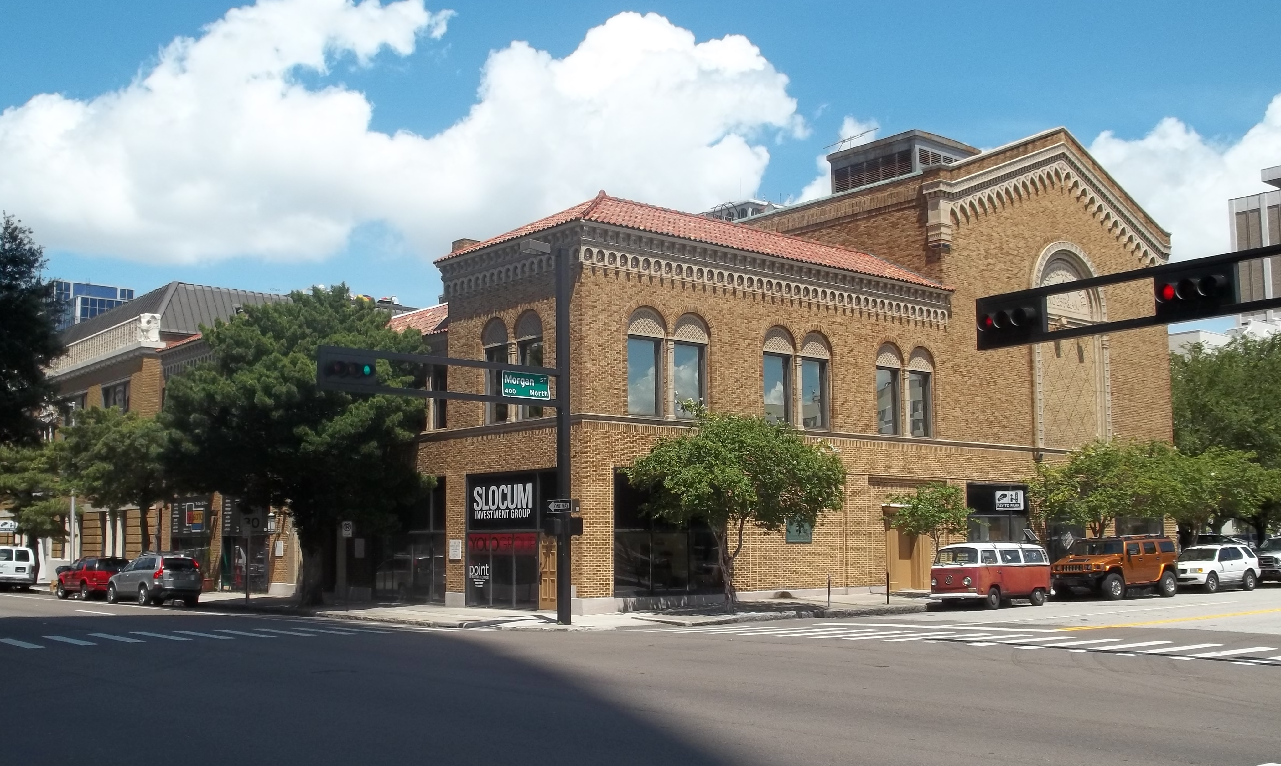 Tampa, Florida: Masonic Temple No. 25